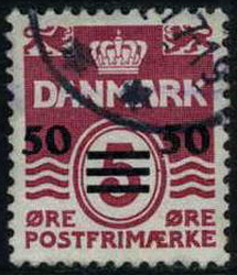 Местная почтовая марка Фарерских островов. Надпечатка на марке Дании. 1940